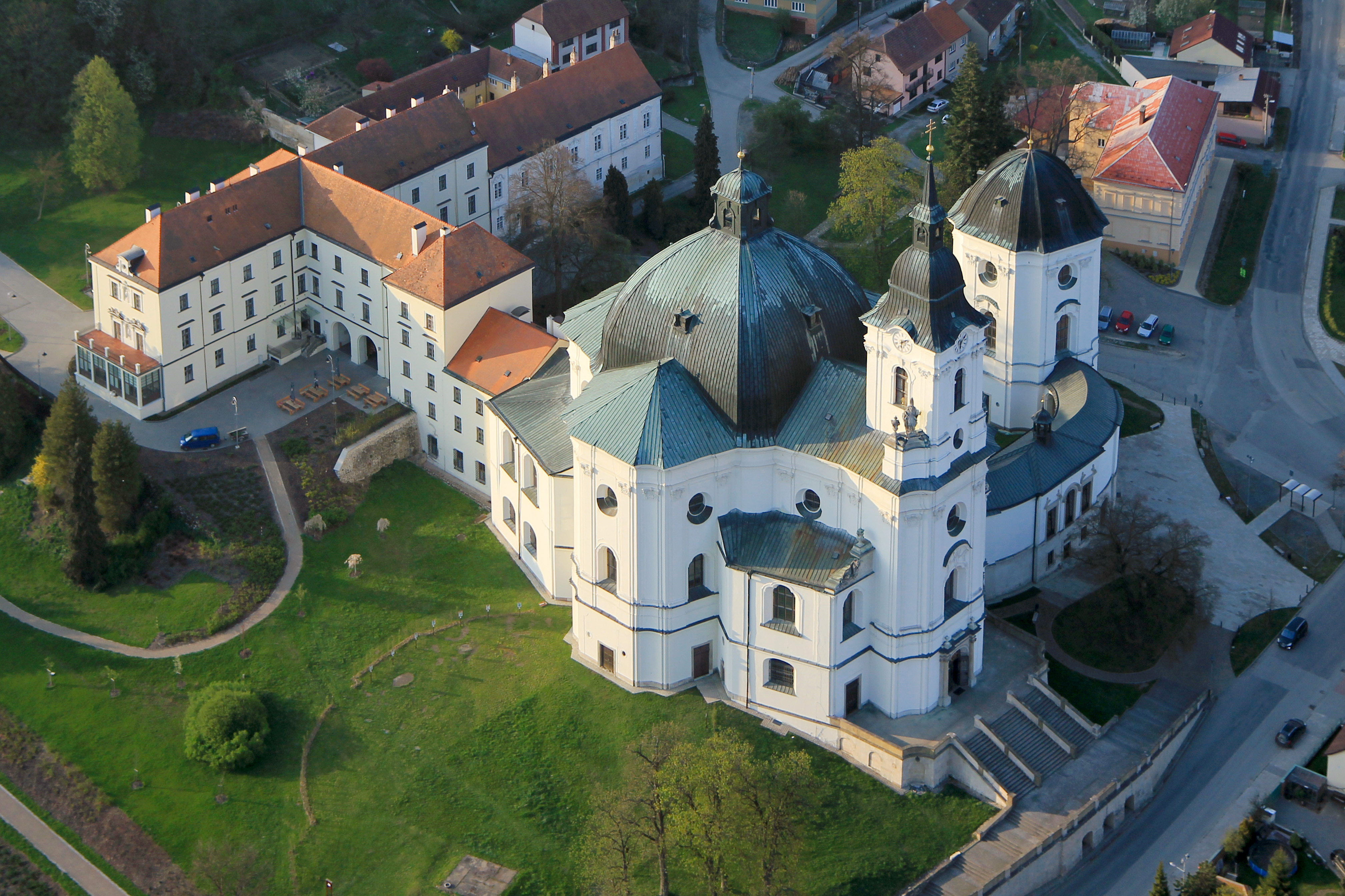 Poutní areál kostela Jména Panny Marie, Křtiny (okres Blansko).